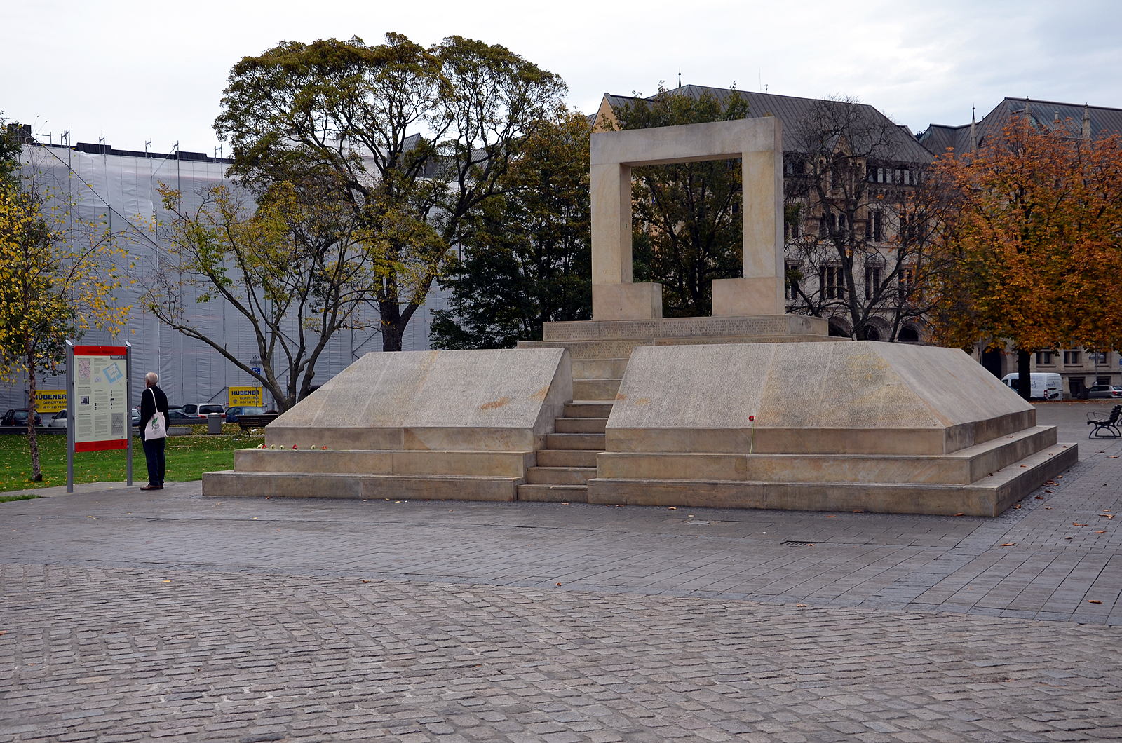 Am 25. Oktober 2013 ab 13.00 Uhr enthüllten Ingrid Wettberg, die Vorsitzende der Liberalen Jüdischen Gemeinde Hannover, gemeinsam mit Hannovers Kultur- und Schuldezernentin Marlis Drevermann, die Informationstafel zum Mahnmal für die ermordeten Juden Hannovers. Begleitet von den Klängen des Musikers Thomas Zander und vorgetragener Inhalte der Tafel durch Schüler der St. Ursula-Schule Hannover nahmen zahlreiche Gäste aus Politik, Kultur und Gesellschaft an der Veranstaltung teil, darunter die Holocaust-Überlebenden Salomon Finkelstein und Henry Korman ...